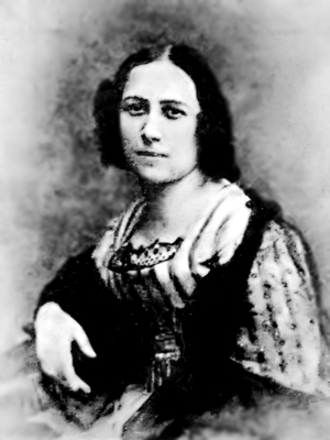 Carlotta Ferrari bei Liber Liber